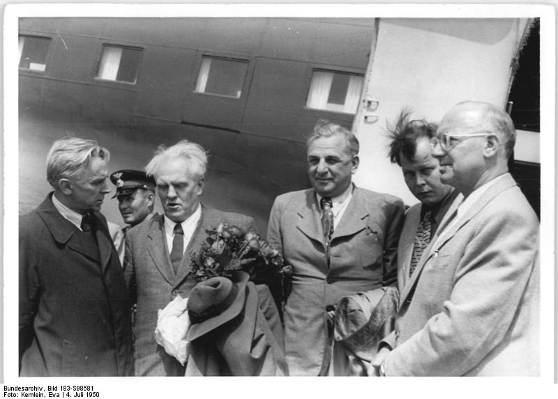 Illus-Kemlein 4.7.50 Am 4.7.50 traf auf dem Flugplatz Schönefeld in Berlin die sowjetischen Schriftsteller-Delegation ein. UBz: (v.l.n.r.) Konstantin Fedin, Nikolai Tichonow, Petr Pawlenko, Alexander Twardowski im Gespräch mit Johannes R. Becher. 7096-50